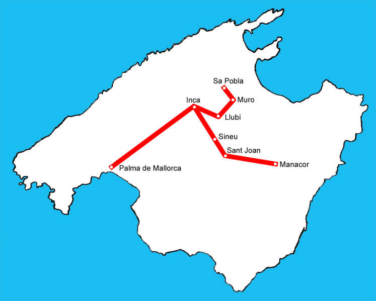 Líneas de Servicios Ferroviarios de Mallorca